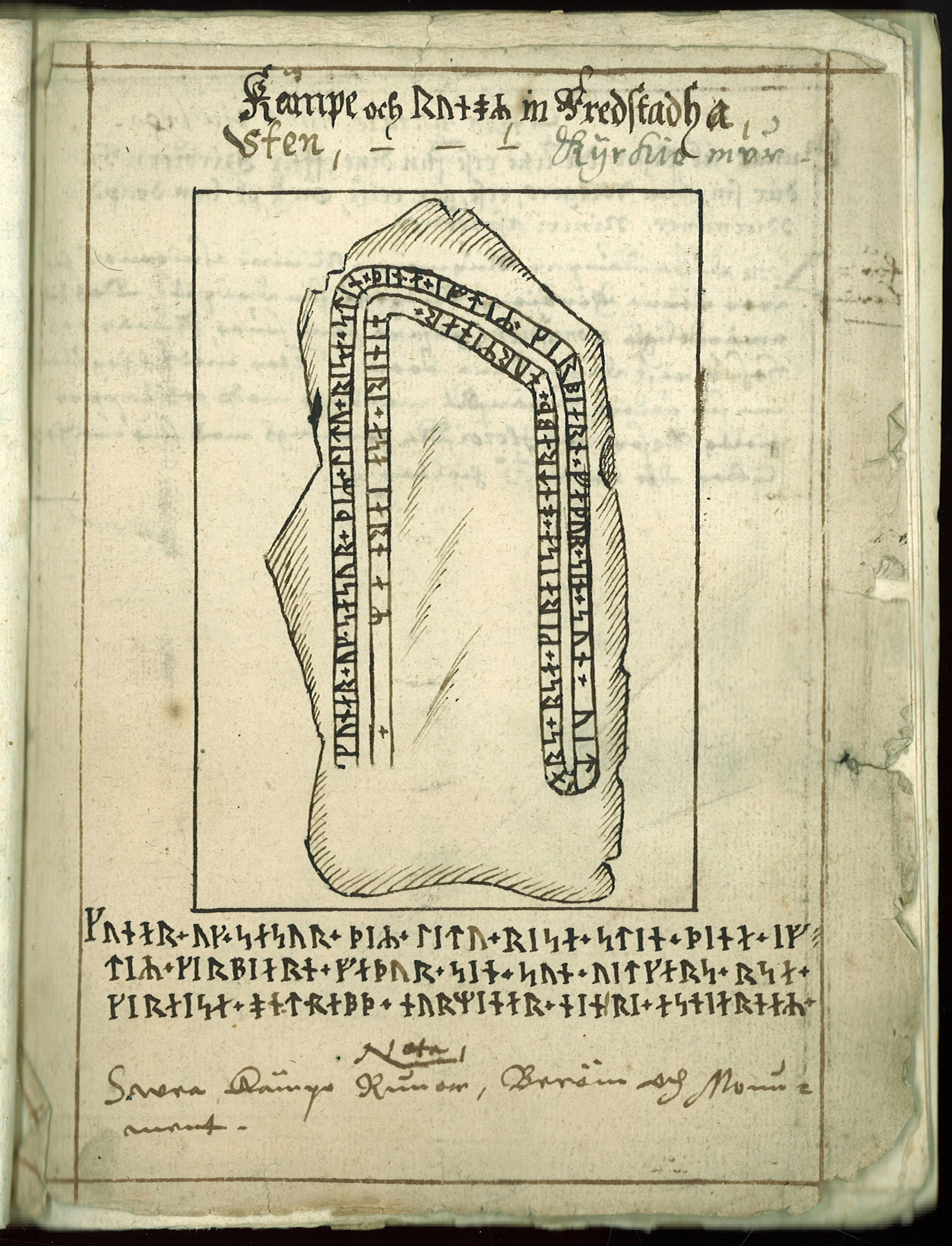 Runsten (U 258), på 1600-talet inmurad i Fresta kyrka. Under 1700-talet murades stenen in bakom en tornvägg, och var därför dold. 1940 togs stenen fram och är nu uppställd på norra sidan av kyrktornet. Ur Collectaneum Monumentale Runicum. Aschaneus avbildning saknar en detalj i mitten. Inskrift: "Gunnar och Sassur de läto resa denna sten efter Gerbjörn, sin fader, som av Vitkarl i Svalnäs(?). Honom dråpo norrmän på Åsbjörns skepp." I Sveriges runinskrifter. Bd 6, Upplands runinskrifter, D. 1, 1940-1943, omnämns en "dålig och ofullständig bläckteckning" av Aschaneus. Källa: Stifts- och landsbiblioteket i Skara: MS Språkvetenskap 15, 40r